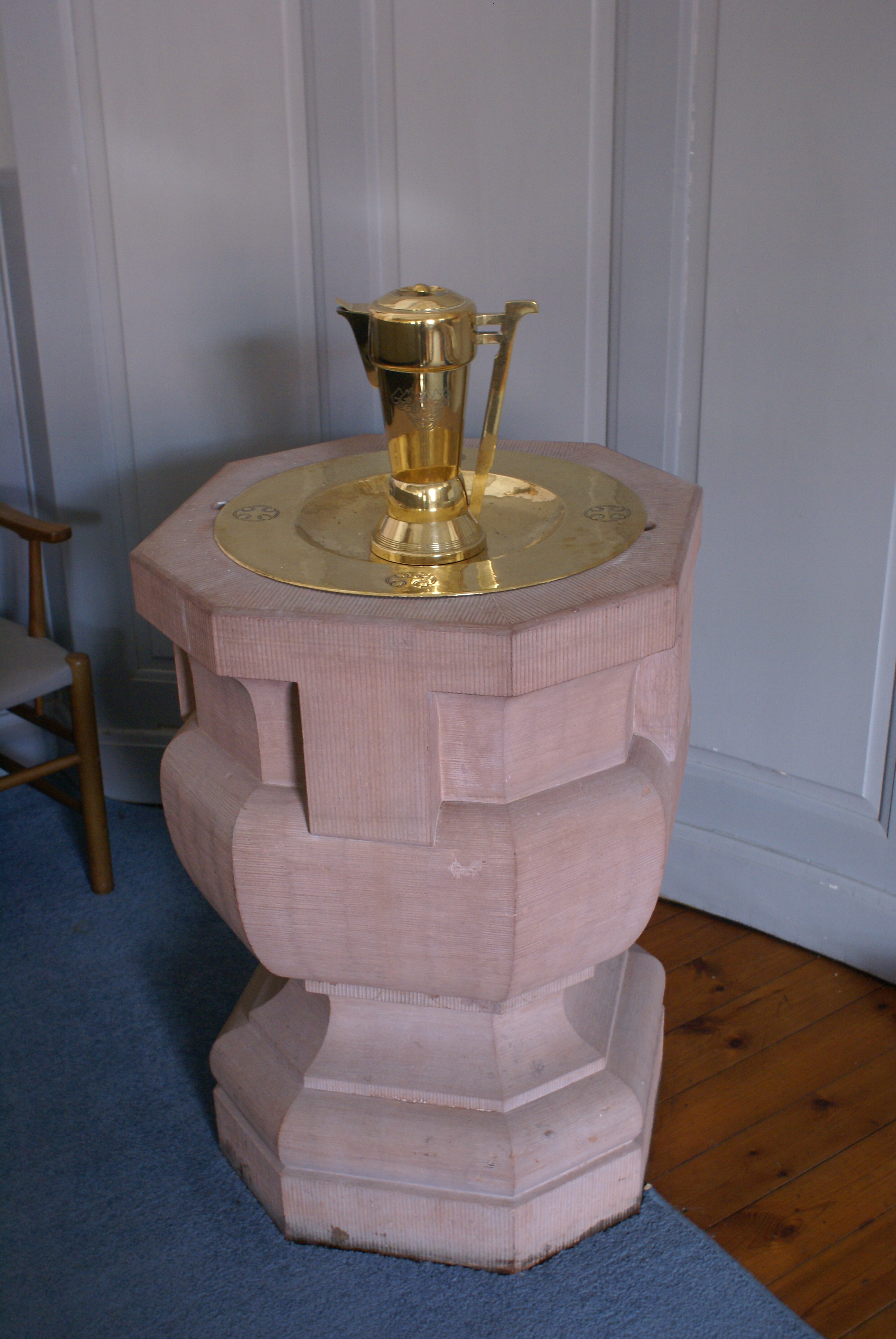 Døbefonten i hospitalskirken på Psykiatrihospitalet i Nykøbing Sj.